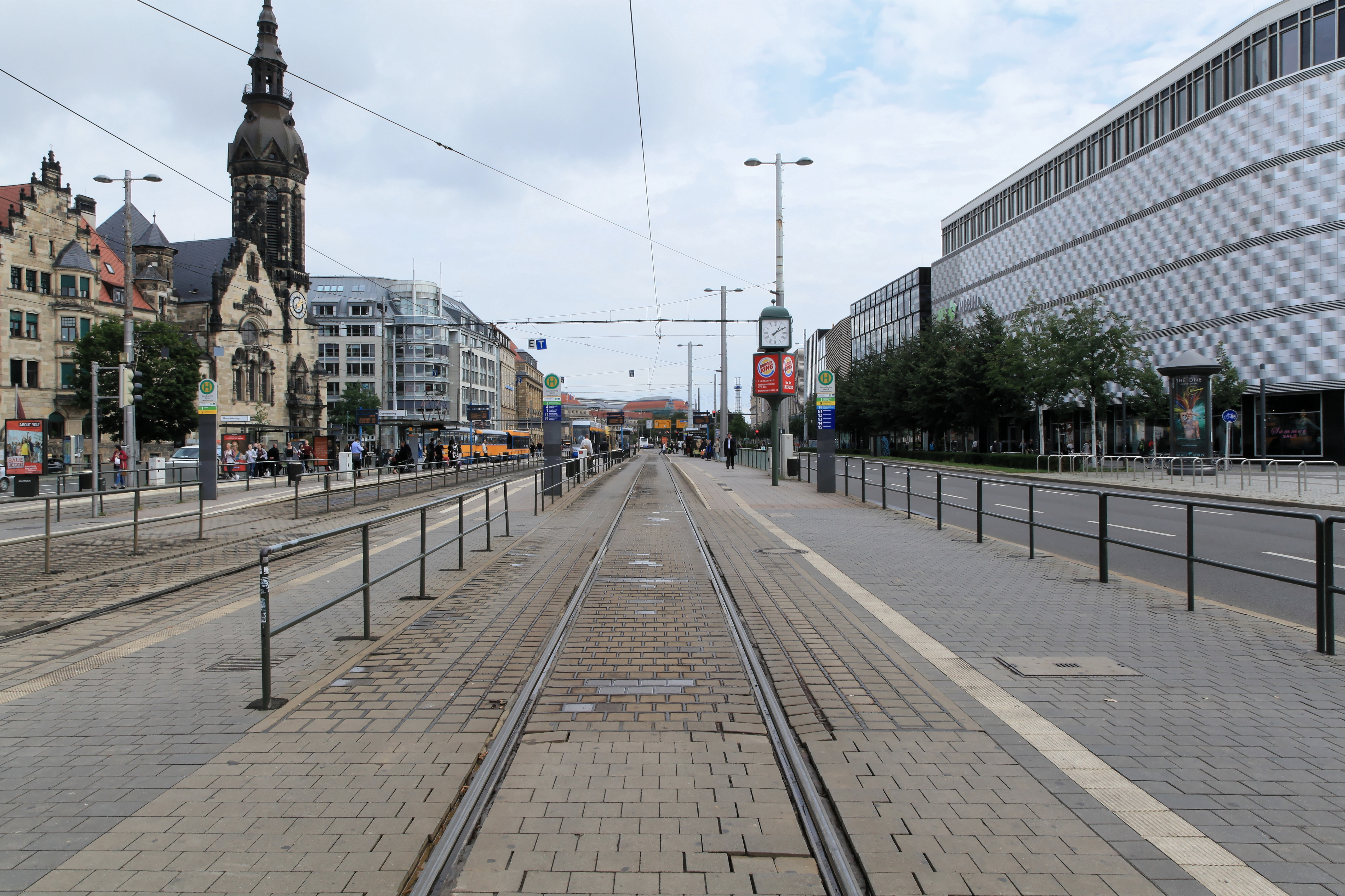 Tröndlinring zwischen der Reformierten Kirche und den Höfen am Brühlin Leipzig